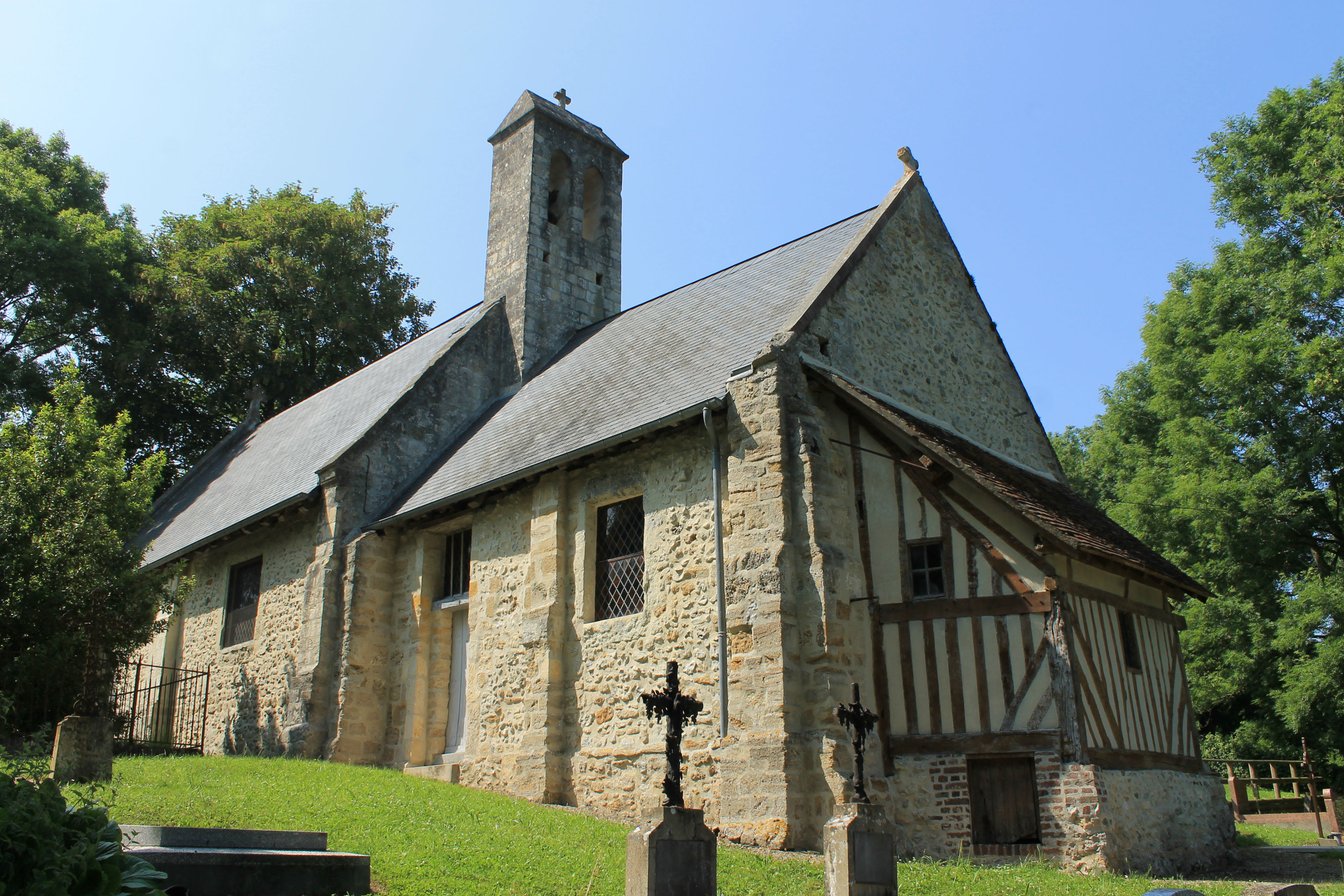 Eglise Notre-Dame à Heuland (Calvados)